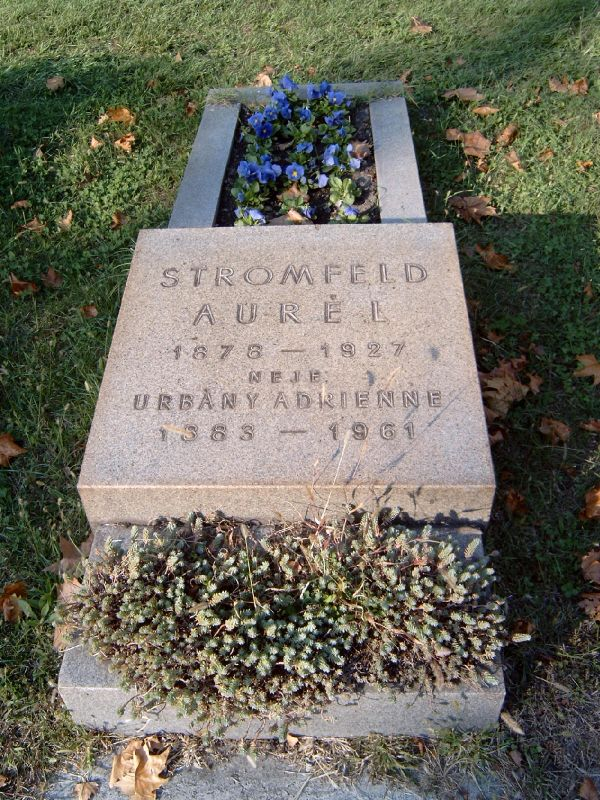 Stromfeld Aurél (Bp., 1878. szept. 19. – Bp., 1927. okt. 10.) vezérkari tiszt sírja Budapesten. Kerepesi temető: Mm. B. 9.